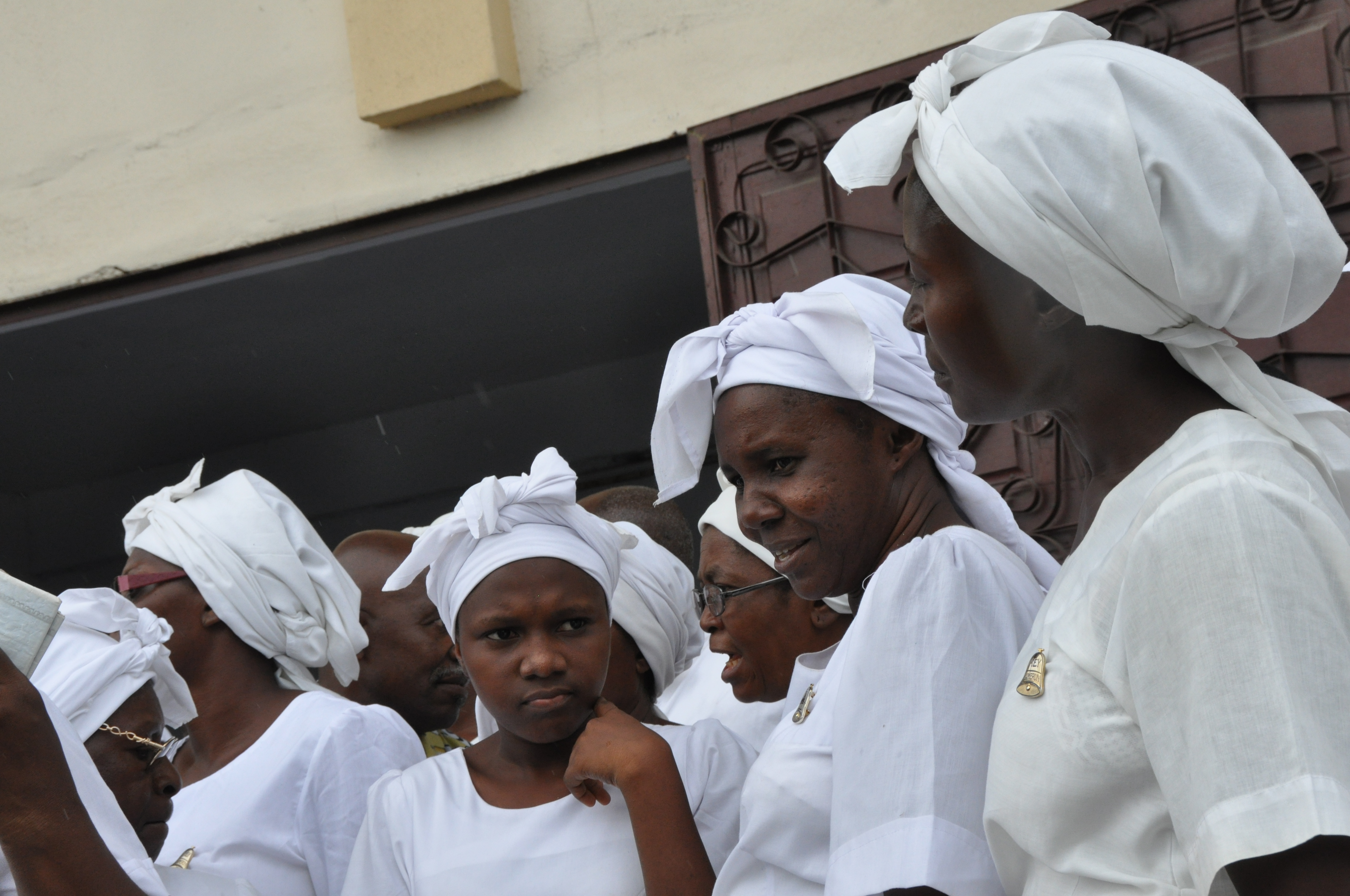 Femmes sawa - Littoral camerounais This is an image of Cultural Fashion or Adornment from Cameroon